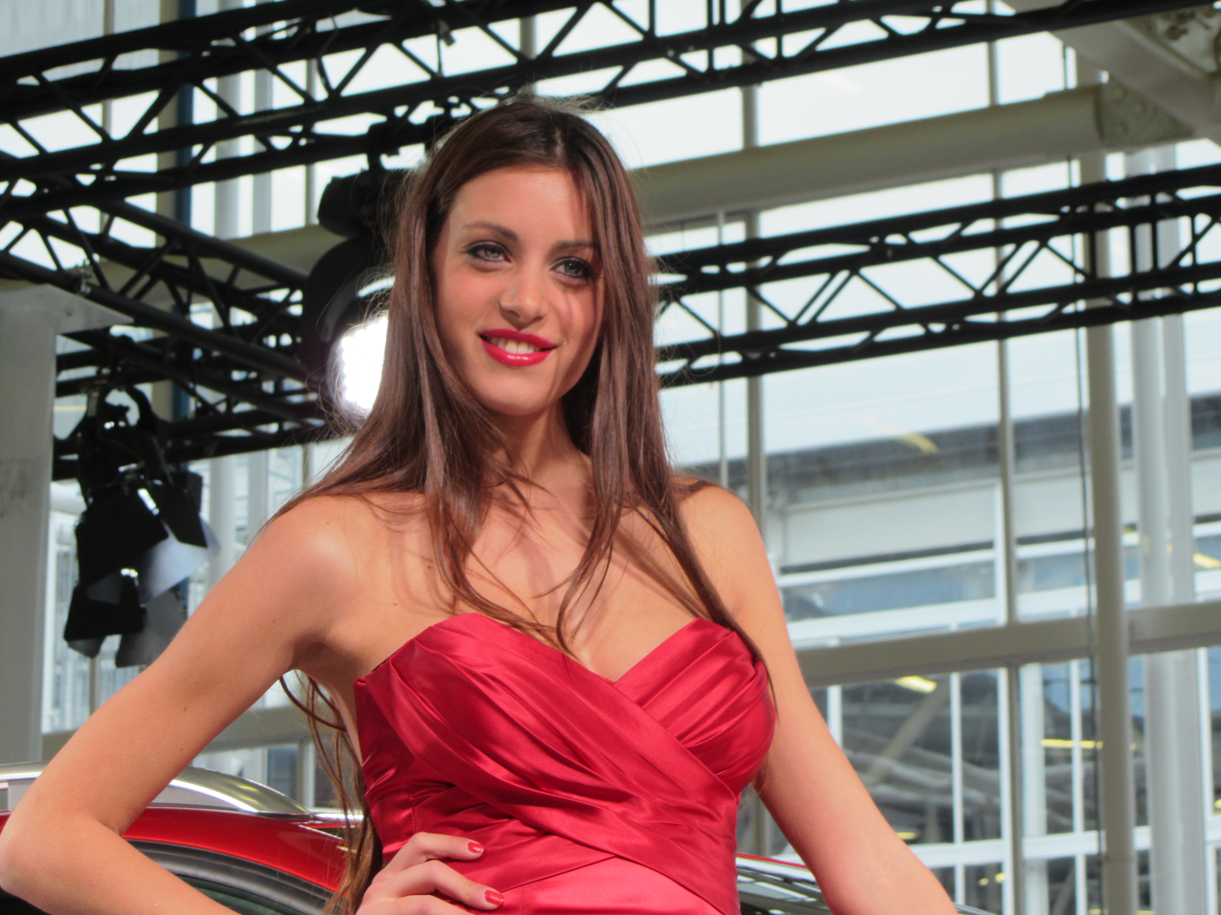 modella al Motorshow di Bologna 2012 stand FIAT